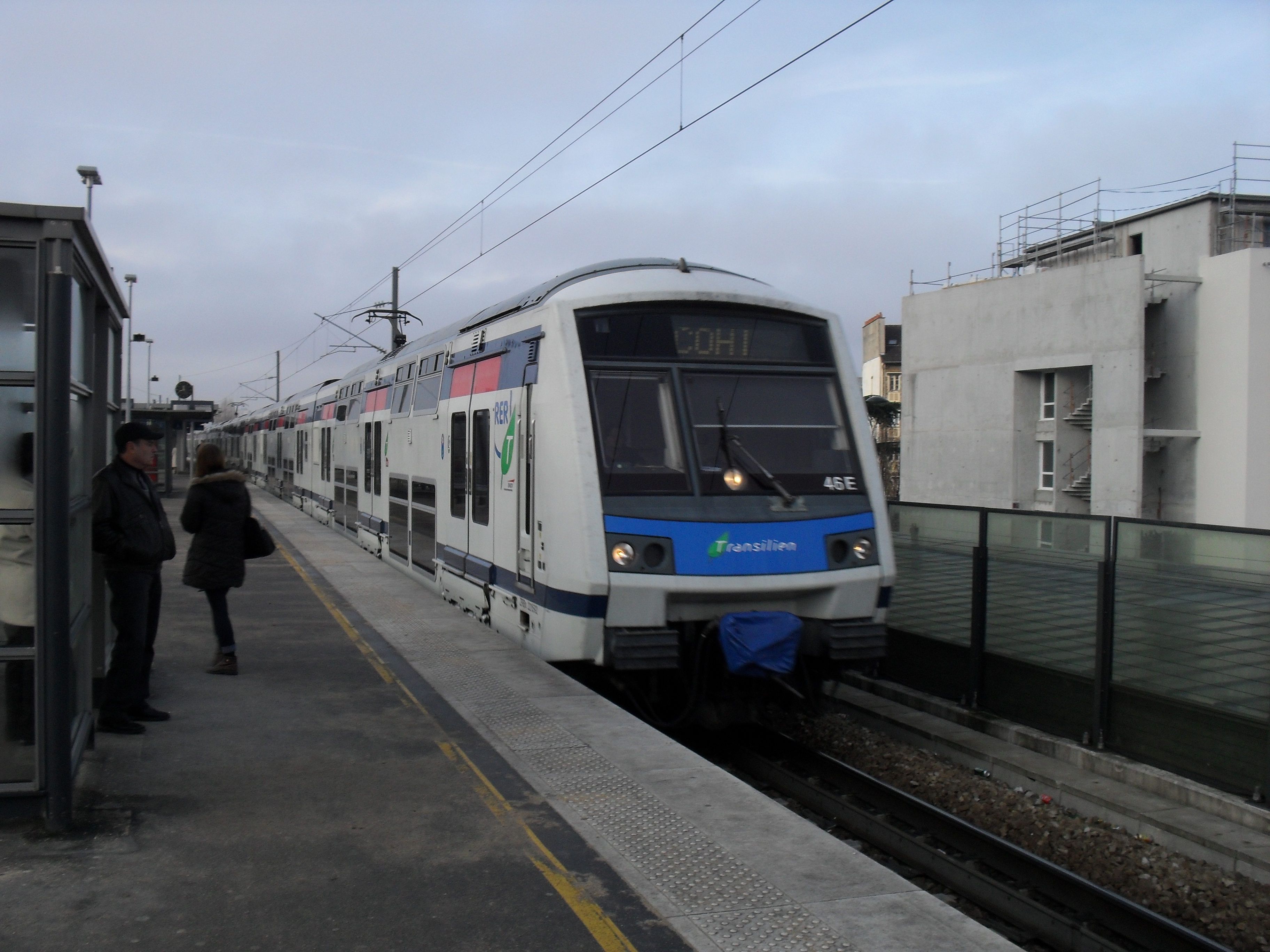 Rame COHI à Chelles